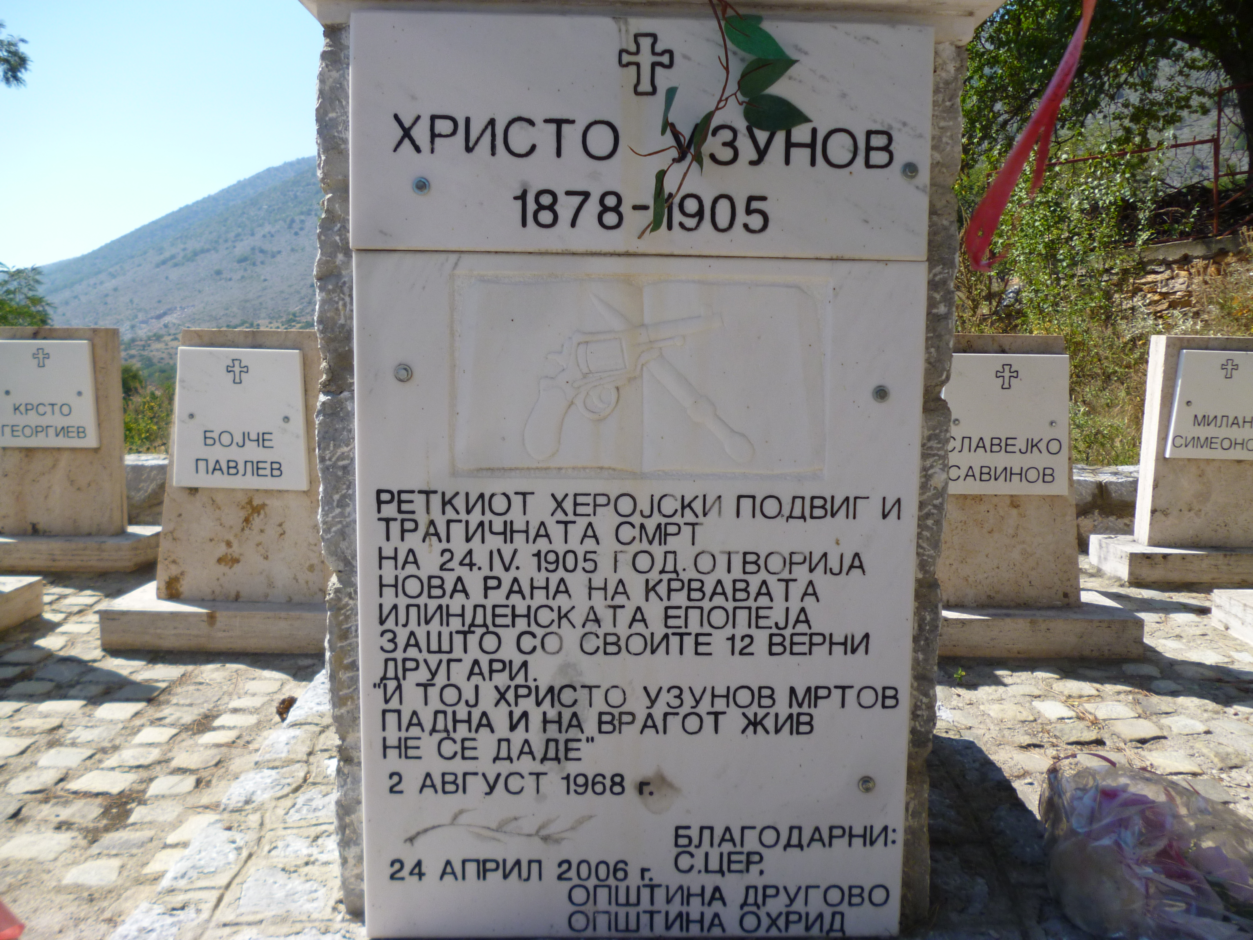 Споемник на Христо узунов и неговата чета во село Цер